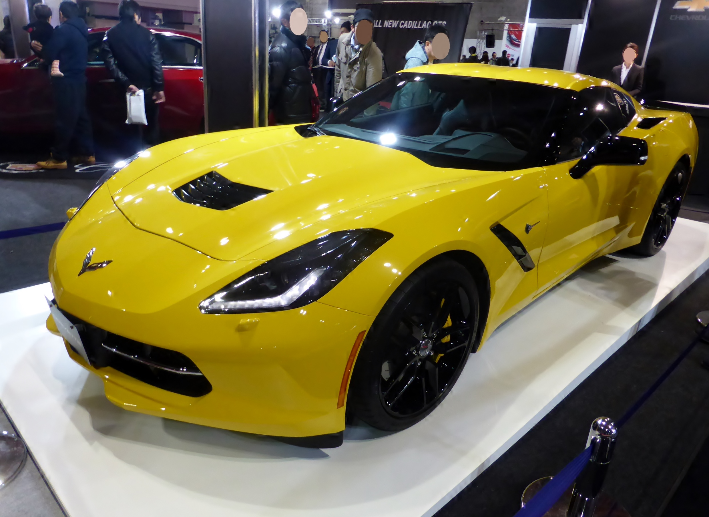 大阪モーターショー2013のシボレーブースにおいてC7コルベットスティングレイを撮影。